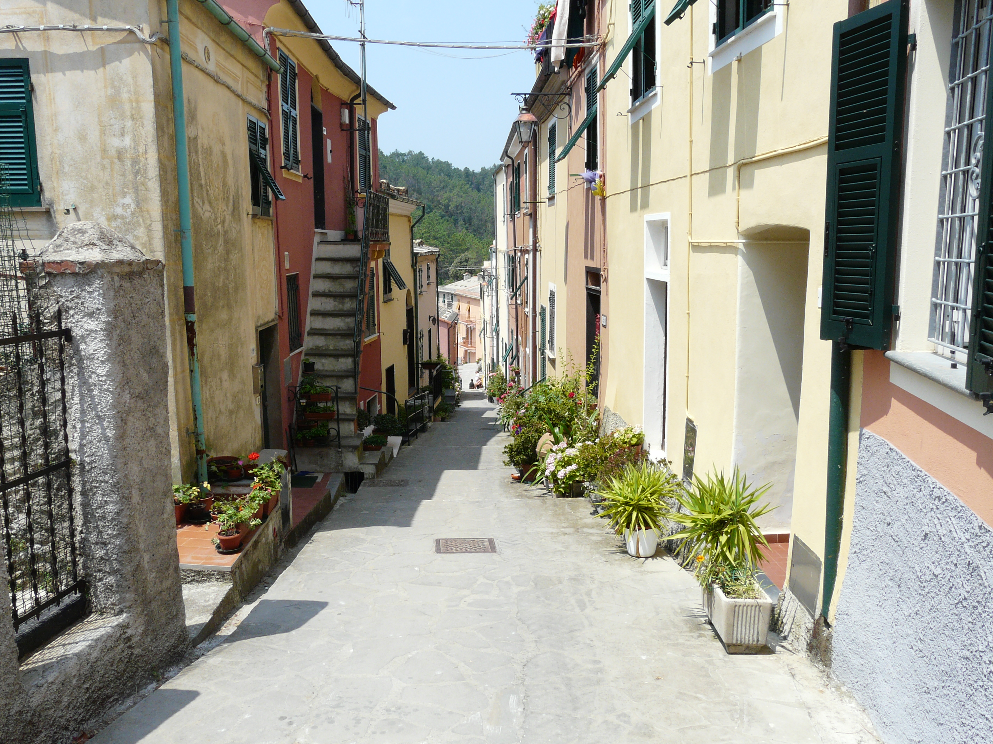 Costa di Framura, Liguria, Italia